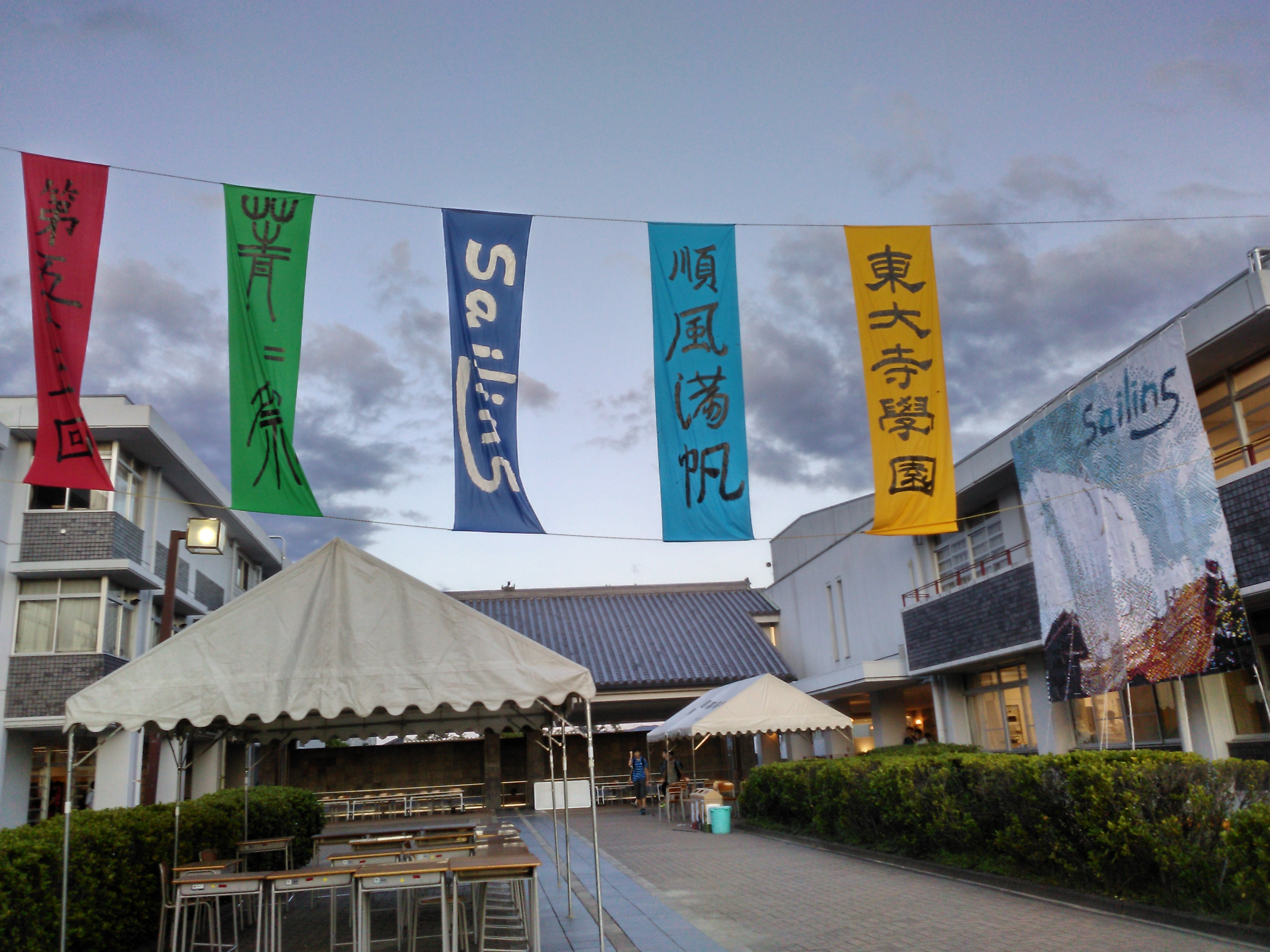 夕暮れ時の風にはためく東大寺学園菁々祭の旗（2019年）